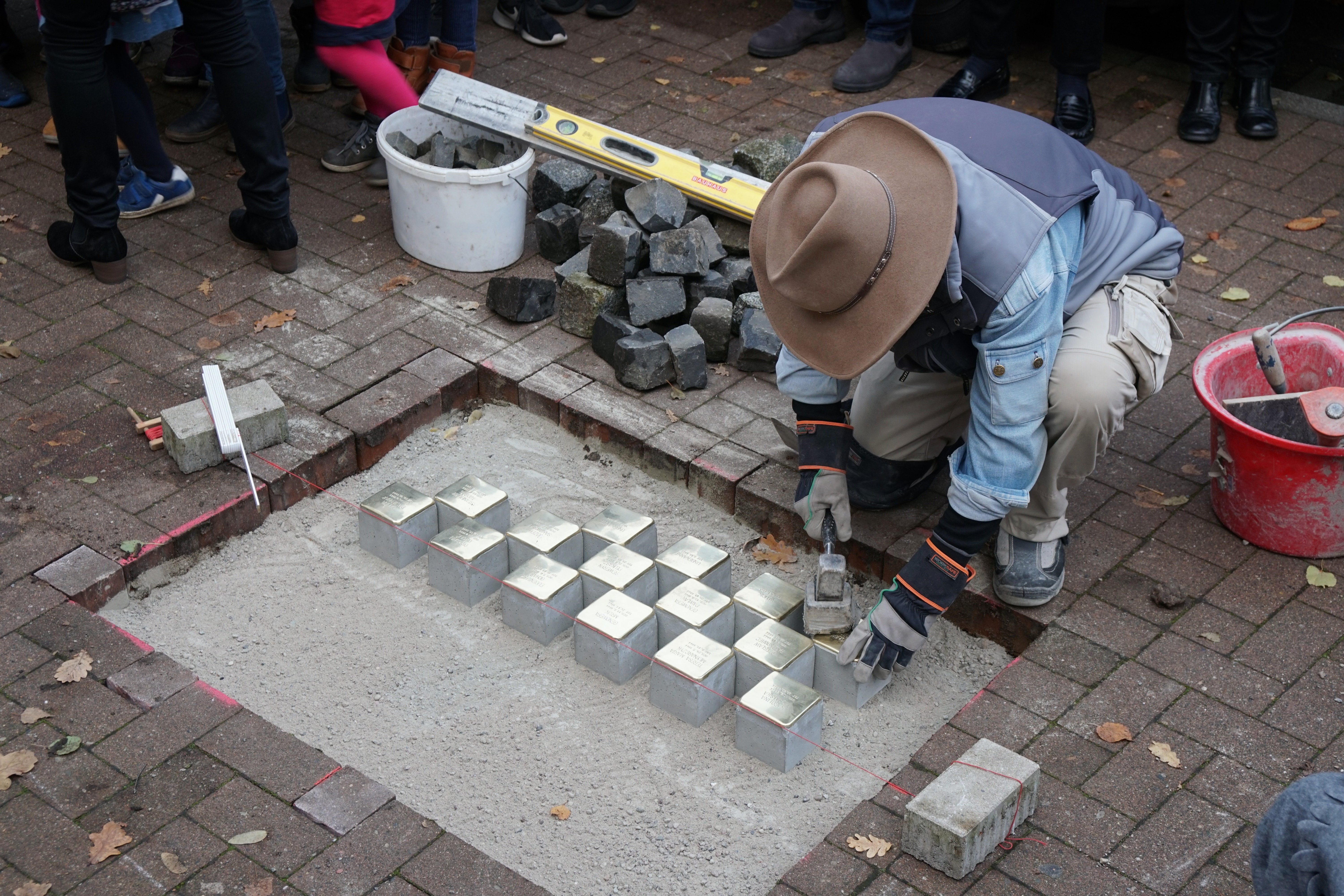 Verlegung von 28 Stolpersteinen in Großburgwedel Verlegung von 28 Stolpersteinen in Großburgwedel